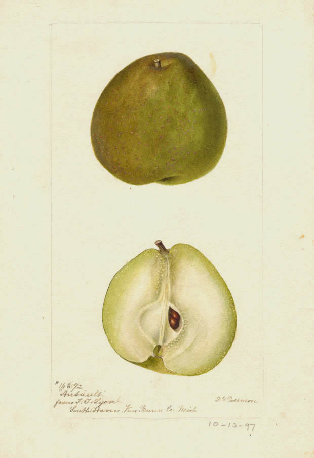 中文（中国大陆）: Ansault，一种灭绝的梨品种